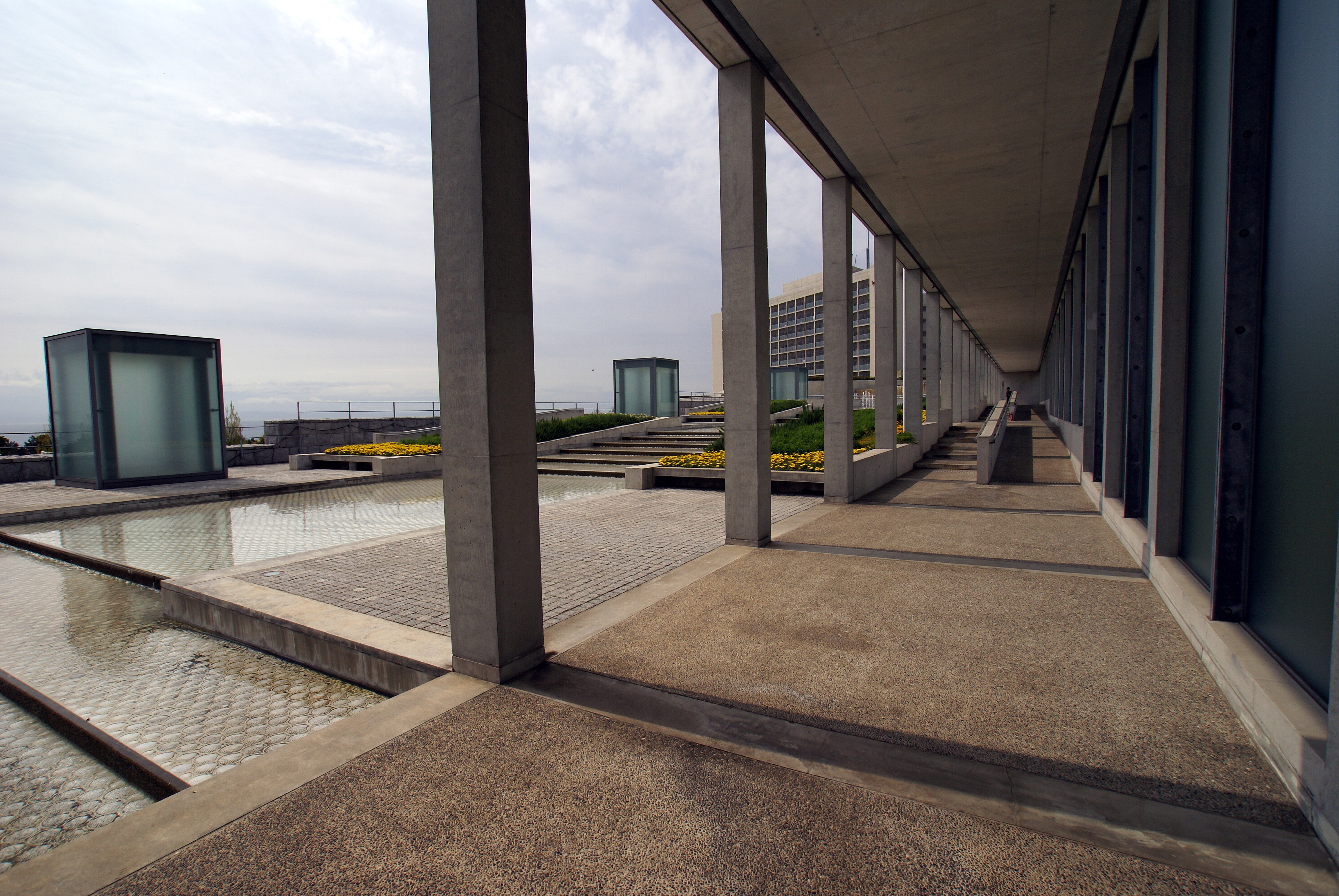 Awaji Yumebutai in Awaji, Hyogo prefecture, Japan